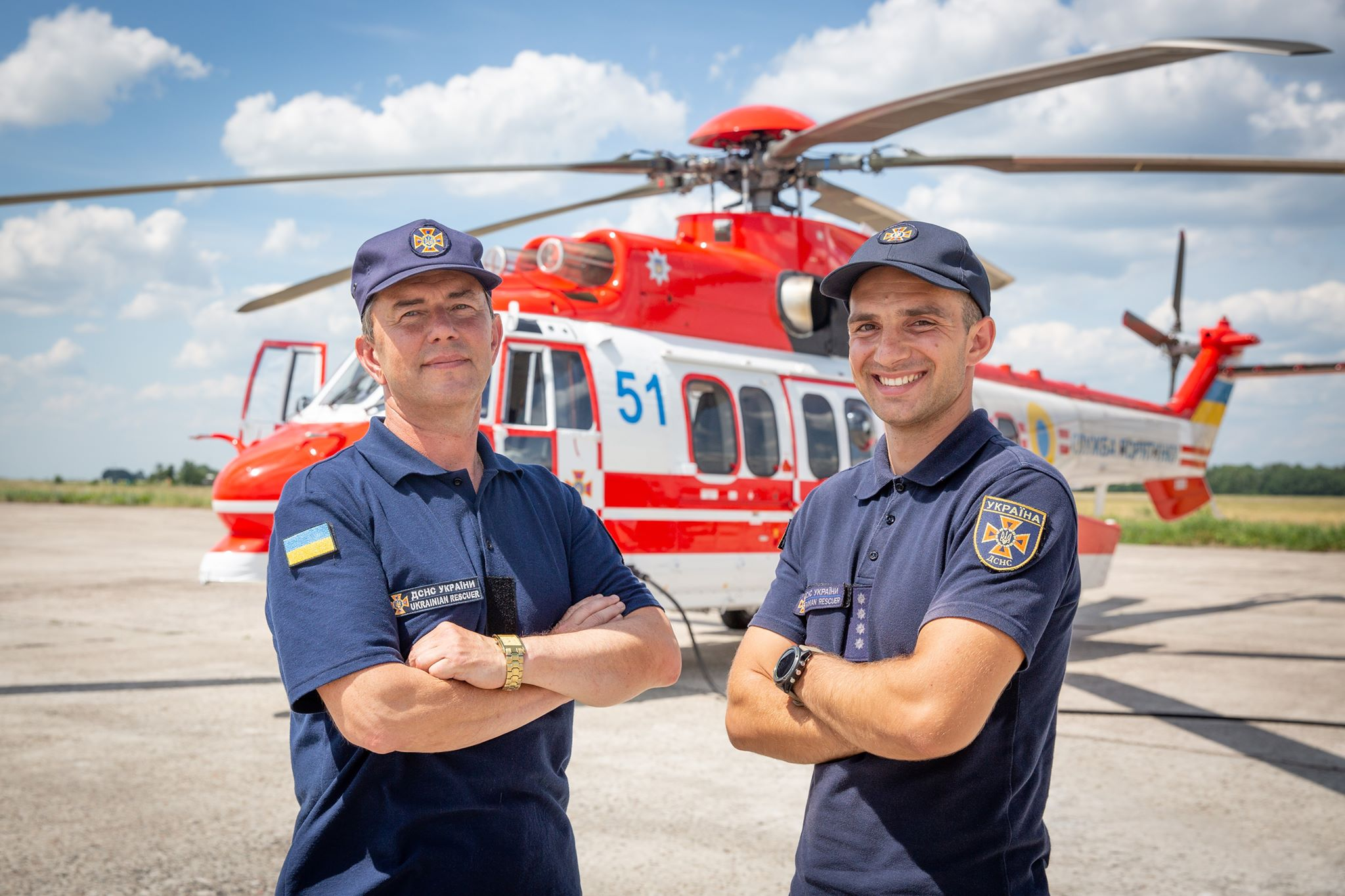 H225 Super Puma приземлився на аеродромі Ніжинського авіаційного загону.